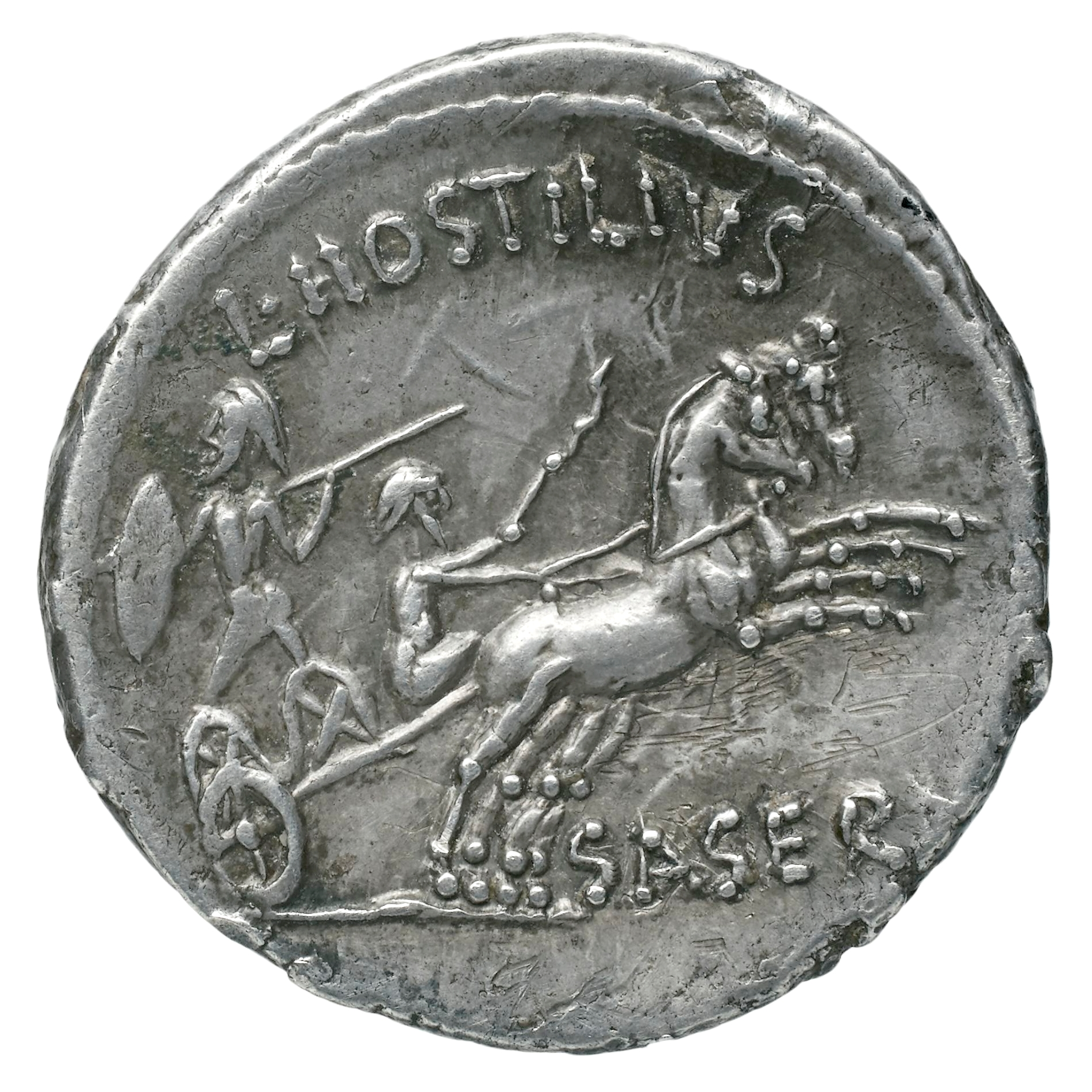 Denier de L. Hostilius Saserna. Argent, 3,82 gr. Avers : L. HOSTLIUS SASER(na) Un guerrier barbare armé d'une lance sur un char à quatre roues et deux chevaux conduit par un aurige. Rome, 48 av.JC. Collection BnF : REP-12282